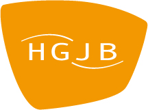 Logo HGJB